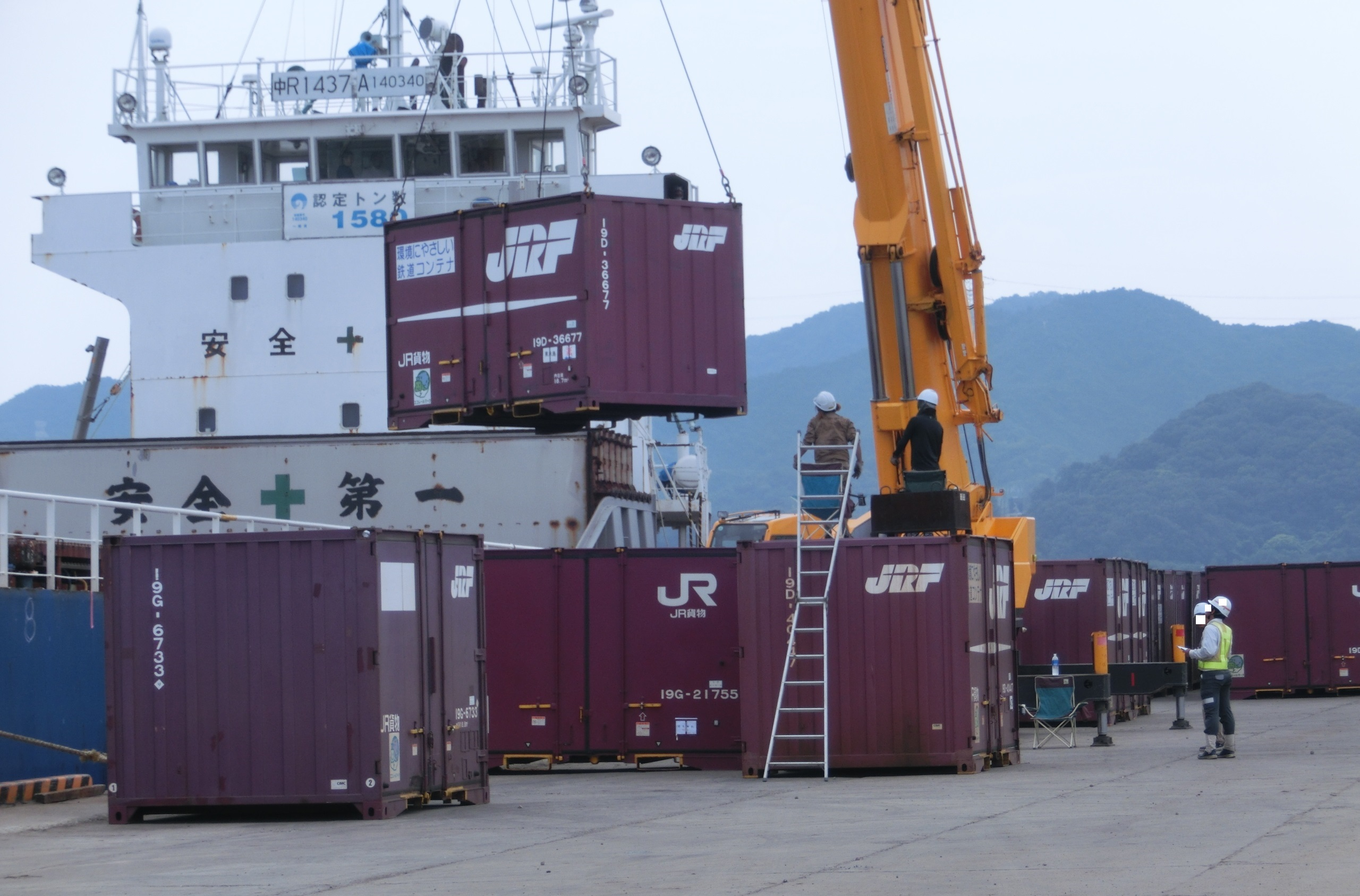 三度目の移転で広大な敷地と、完全に隔離され夜間留置の安全性が高まった岡山市東区にある 「 岡山新港高島埠頭 」 で、JR貨物所有の12ft形コンテナを船舶代行輸送する風景。 停泊している内航船で、北九州港へ一日一往復していた。 内航船の横に設置されたクレーン車で吊り作業を行い、コンテナの敷地内の移動は、二台の10t級フォークリフトで行う。 ＝＝＝＝＝＝＝＝【 総 括 】＝＝＝＝＝＝＝＝ 2018年 ( 平成30年 ) 7月5日 ( 木 ) から岡山県や広島県及び、山口県内の各地で発生した 「 平成３０年７月豪雨 」 の影響により、三県内の山陽本線で複数個所において、線路喪失を含む大規模な輸送障害が三ヶ月以上にわたり発生した。 これに伴い、元々岡山県内の拠点となっている 「 JR貨物岡山(タ) 」 が今回の輸送障害区間では、事実上の東側の終着点駅となり、この影響で福山通運の30ftコンテナのみを一列車貸切っている 「 福山レールエクスプレス号 」 積載の全コンテナを始め、全国からの九州地区向けの大口宅配や冷凍などで大量に扱われていた20ft及び、30ftの大型コンテナを全て 「 岡山(タ) 」 で臨時に取り扱うこととなった。 「 岡山(タ) 」 ではこれらの大型コンテナを最優先輸送させる為に、広島や山口へのトラック代行輸送する臨時便が一気に集中し、荷役能力の逼迫となってしまった。 また岡山県内の水島臨海鉄道の拠点コンテナ駅である 「 東水島駅 」 への関東からの定期列車は、本来はこの 「 岡山(タ) 」 で一部のコンテナの取り卸と、機関車を付け替えてから 「 東水島駅 」 へ中継輸送していたので、この関東便に関してはさほど問題は無かったが、 通常の 「 東水島駅 」 から 「 岡山(タ) 」 で中継して九州向けのルートが絶たれてしまった。 この打開策として、 「 東水島駅 」 ～ 九州向けの入出荷ルートと、近隣の 「 姫路貨物駅 」 や 「 神戸(タ) 」 での置き去り気味で滞留し続ける12ft形5tコンテナ （ 私有コンテナを除く ） の輸送を確保するために、船舶を利用した 「 災害時の鉄道代行輸送 」 ルートとして、中国地区としては初めてとなる福岡県 「 北九州港 」 までの船舶輸送が始まった。 担当港は、「 東水島駅 」 の最寄港となる 「 水島港 」 を利用すれば一番効率もよく、また駅から港までの輸送費も抑えられるが、当初予想されていた約四ヶ月もの期間を一貫して使用できる用地の確保する見通しがたたず、緊急暫定的処置として、初日の7月18日 ～ 約一週間程度の短期間を、地元の水島港 （ 実地港区は不明 ） で取り扱うこととなった。 7月下旬からは、荷役埠頭敷地や荷役設備の受け入れ準備が整った、東水島駅から陸路で約30キロ離れた岡山市南区の 「 岡山港福島埠頭 (ゲートも無く出入り自由地区) 」 で、8月31日までの期限付きで着地港の変更無く 「 水島港 」 から引き継がれてた。 更に9月1日からは、積み残しや陸路の輸送待ちで安全に夜間でも留置できる設備の確保として、荷役埠頭がフェンスで完全に区画管理されて専用使用できる、陸路で約三キロ離れた河口対岸の岡山市東区にある 「 岡山新港高島埠頭 」 へ、再度移転して一連の代行輸送が最終日となる、9月28日の下り便の出航まで続いていた。